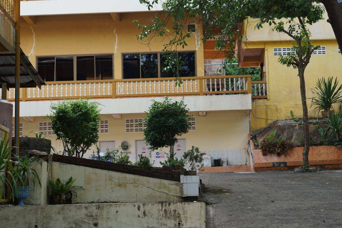 วัดแหลมเสด็จ จันทบุรี